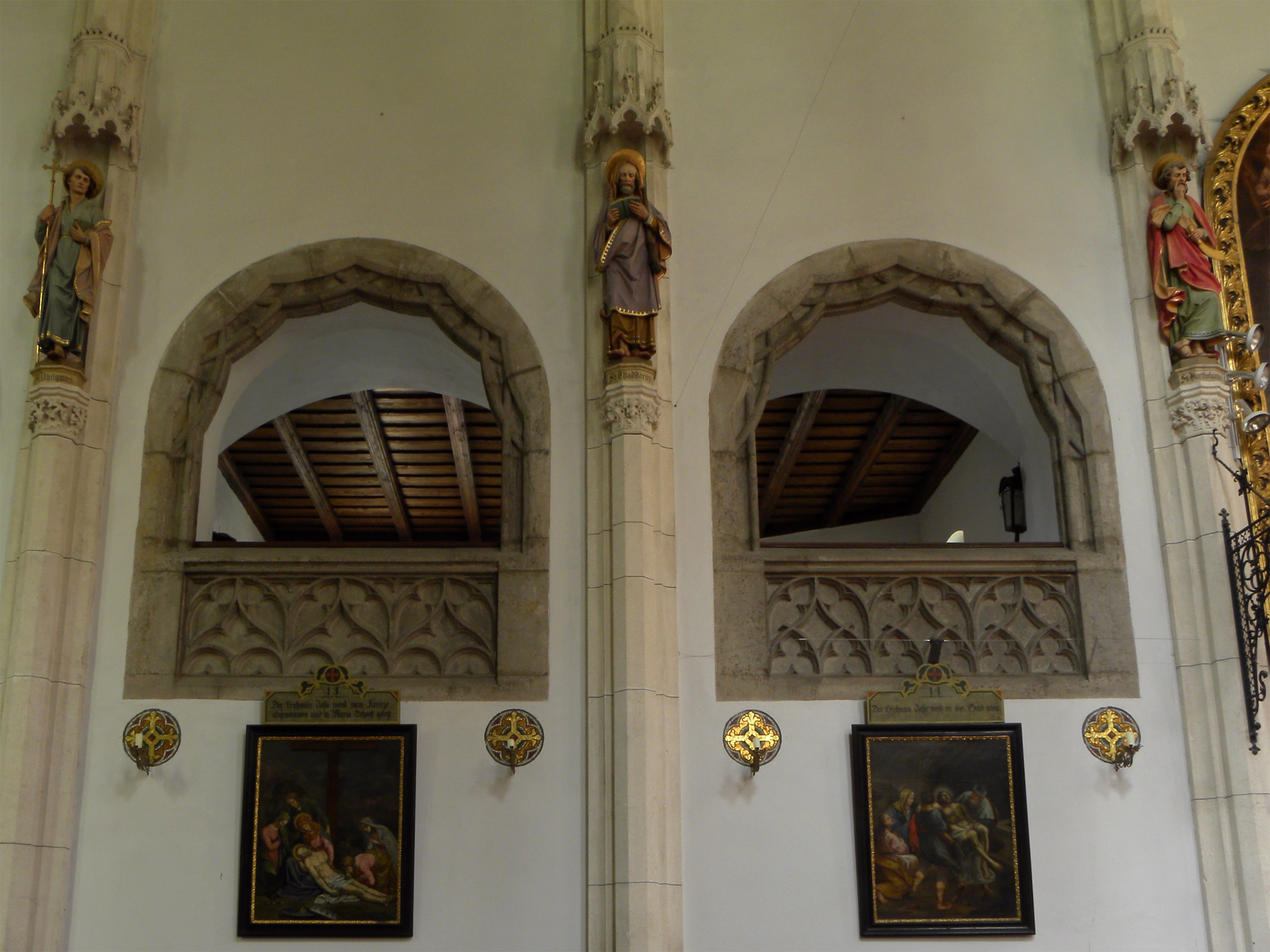 Kirchenfestungsanlage hl. Oswald - im Langchor befindliche Brüstung zum Oratorium